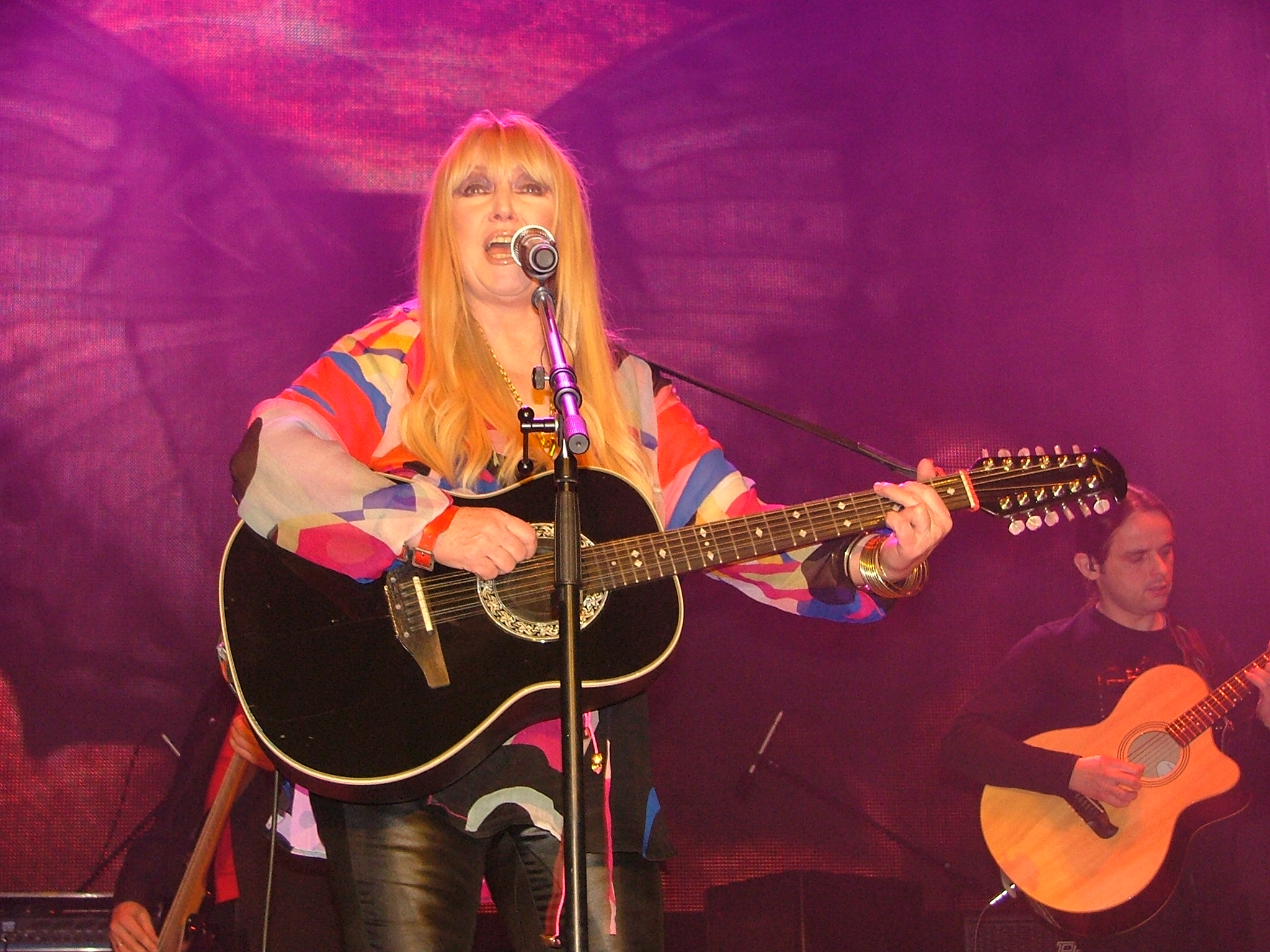 Centralne Obchody Święta Kolejarza 2007, Warszawa, Sala Kongresowa Maryla Rodowicz